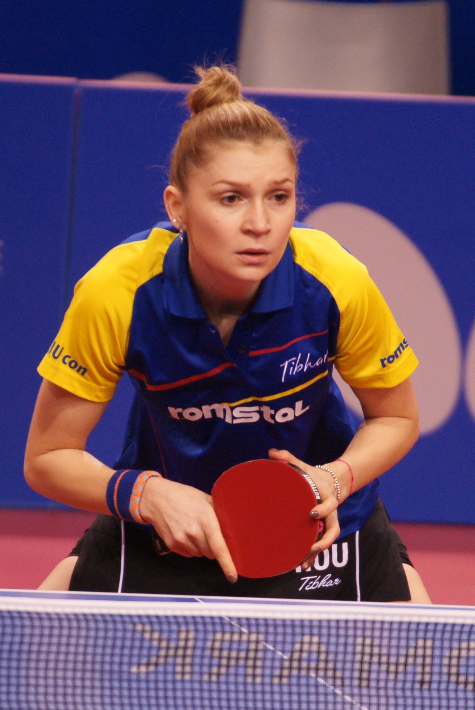 Daniela Dodean, Top 16 Antibes 2017